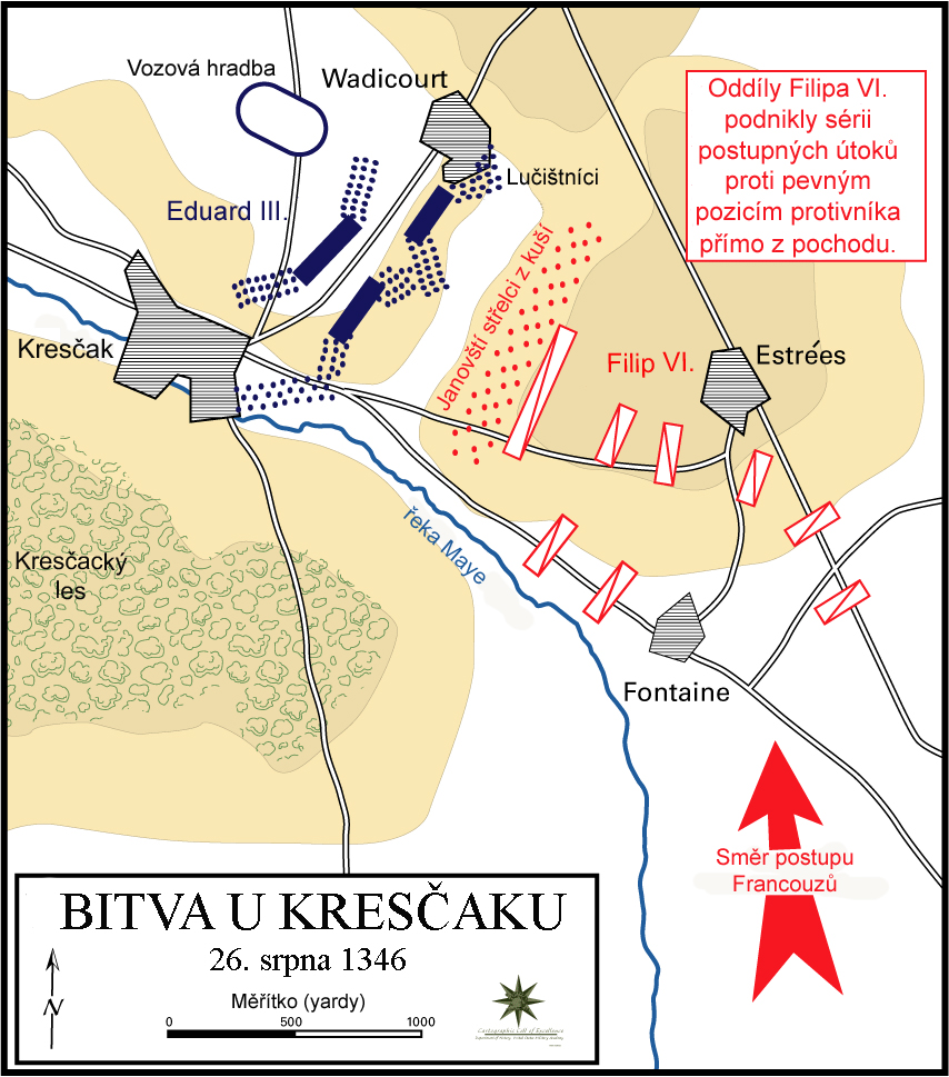 Mapka zachycující pozice vojsk před bitvou u Kresčaku (26. srpna 1346)